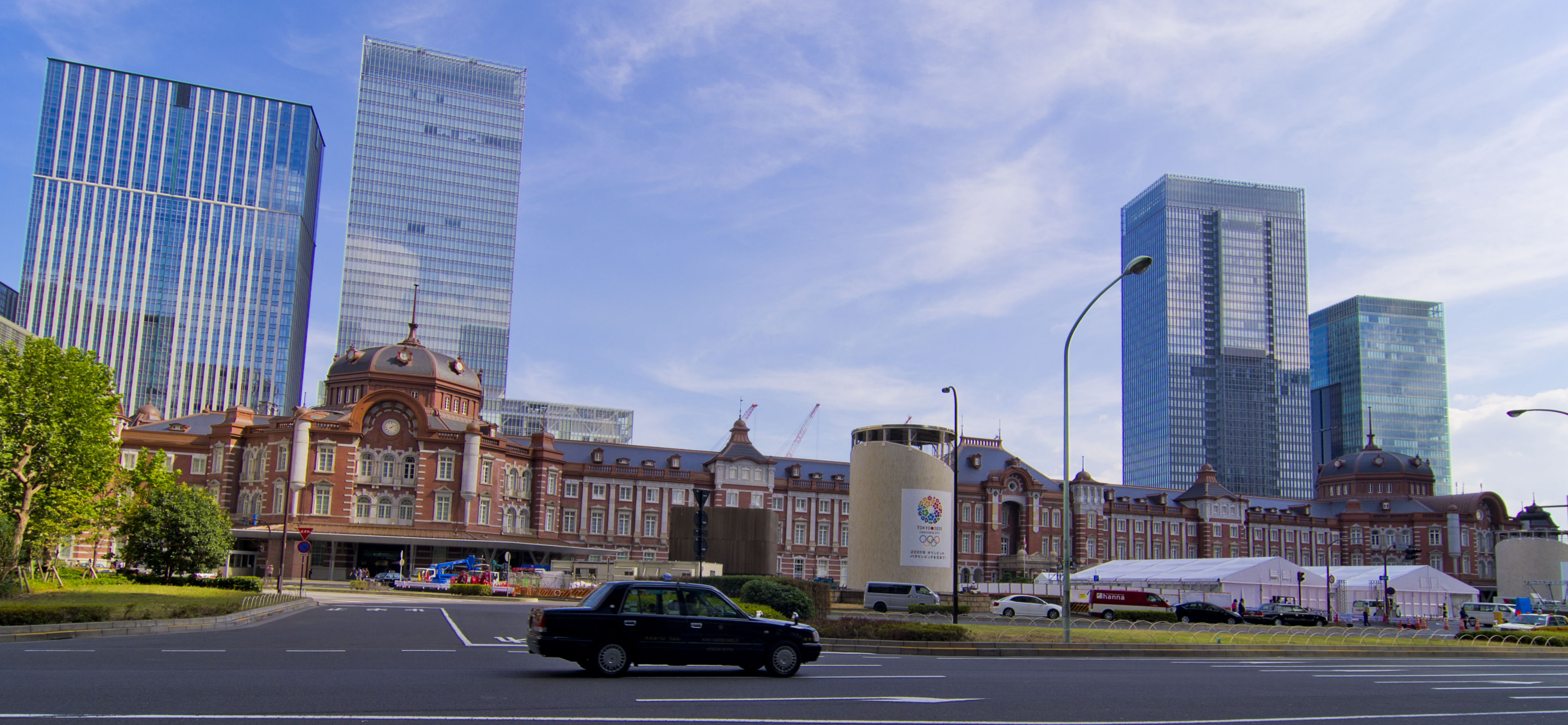 東日本旅客鉄道株式会社東京駅丸の内駅舎 （東京駅復原工事終了一日前の様子）